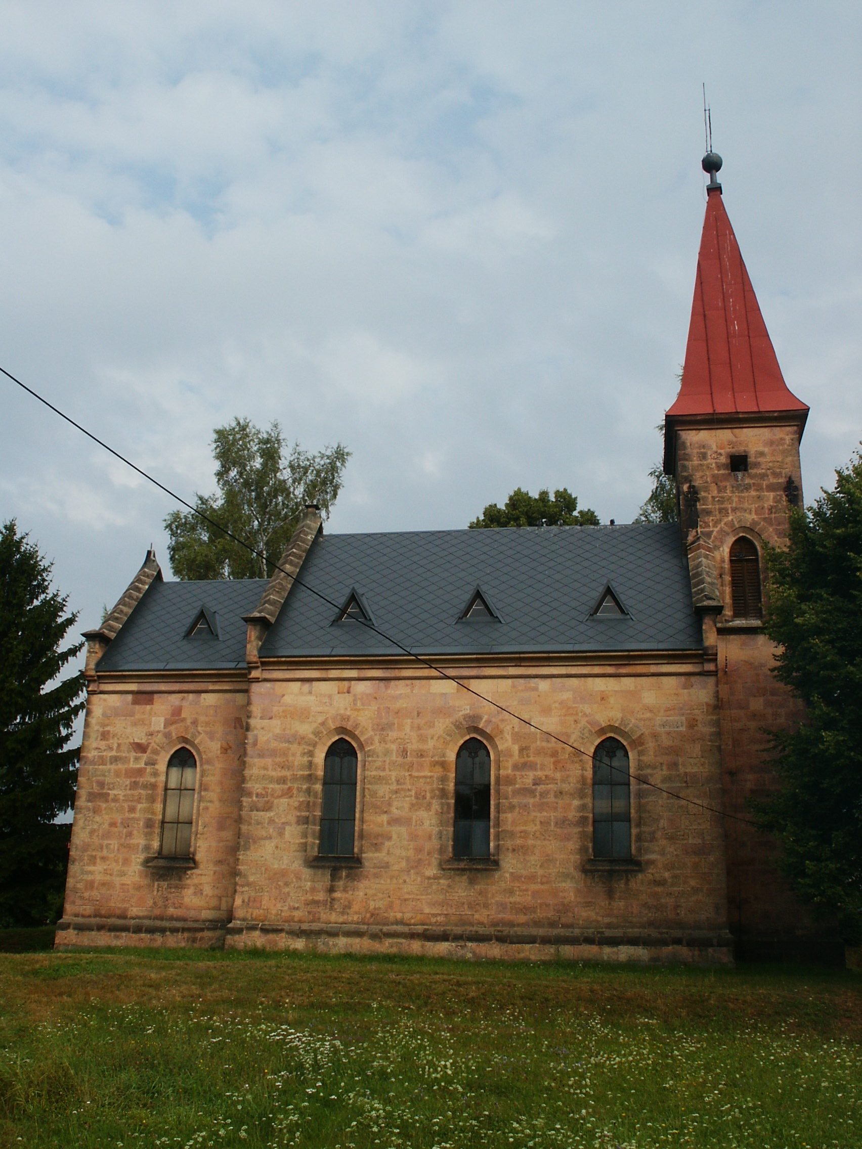 Štikov - kostel Nejsvětější Trojice